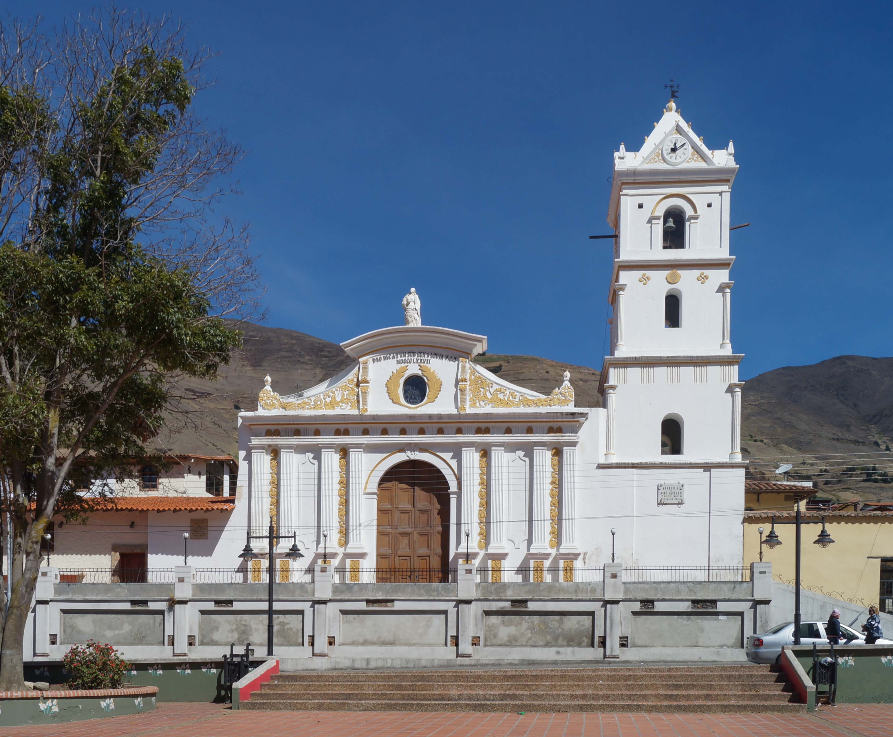 La Iglesia de Santa Lucía, ubicada frente a la Plaza Bolívar en la población de Mucuchies, con una fachada de estilo andino tradicional, construida en el año 1.877. En su interior se encuentran las imágenes de Santa Lucía, San Isidro, San Benito y Santa Cecilia, también descansan los restos del Presbítero Jesús Manuel Jáuregui, sacerdote fundador del Colegio Sagrado Corazón de Jesús en La Grita, estado Táchira.Mérida. Venezuela.